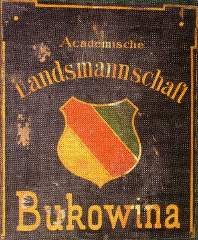 Hausschild der Wiener Landsmannschaft Bukowina (1867-1882)